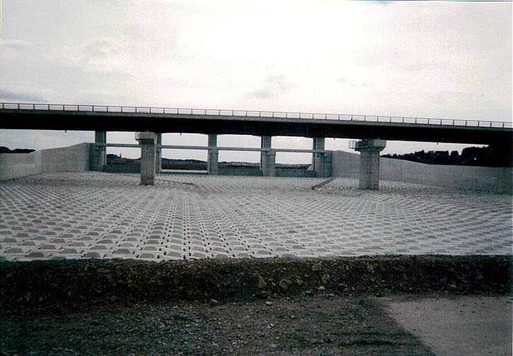 Dam